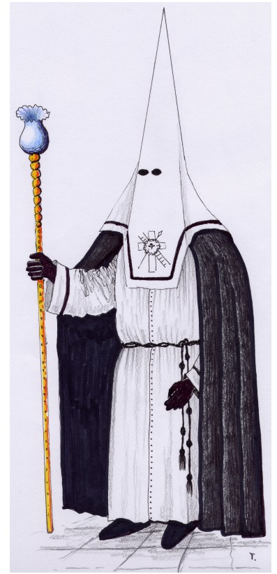 Traje de la Real Cofradía El Descendimiento de N.S.JC. de Requena